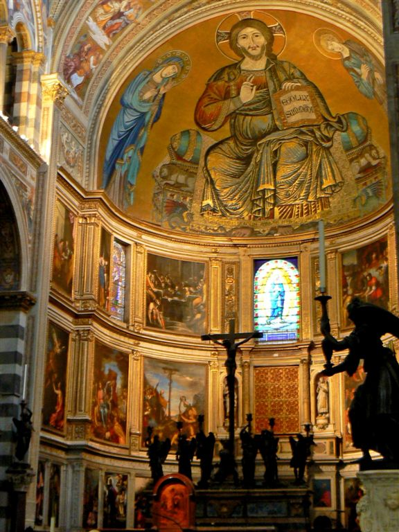 Deesis, mosaico di Cimabue nel catino absidale della cattedrale di pisa, 1301/1302.